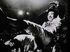 20勝を挙げ胴上げされる池永